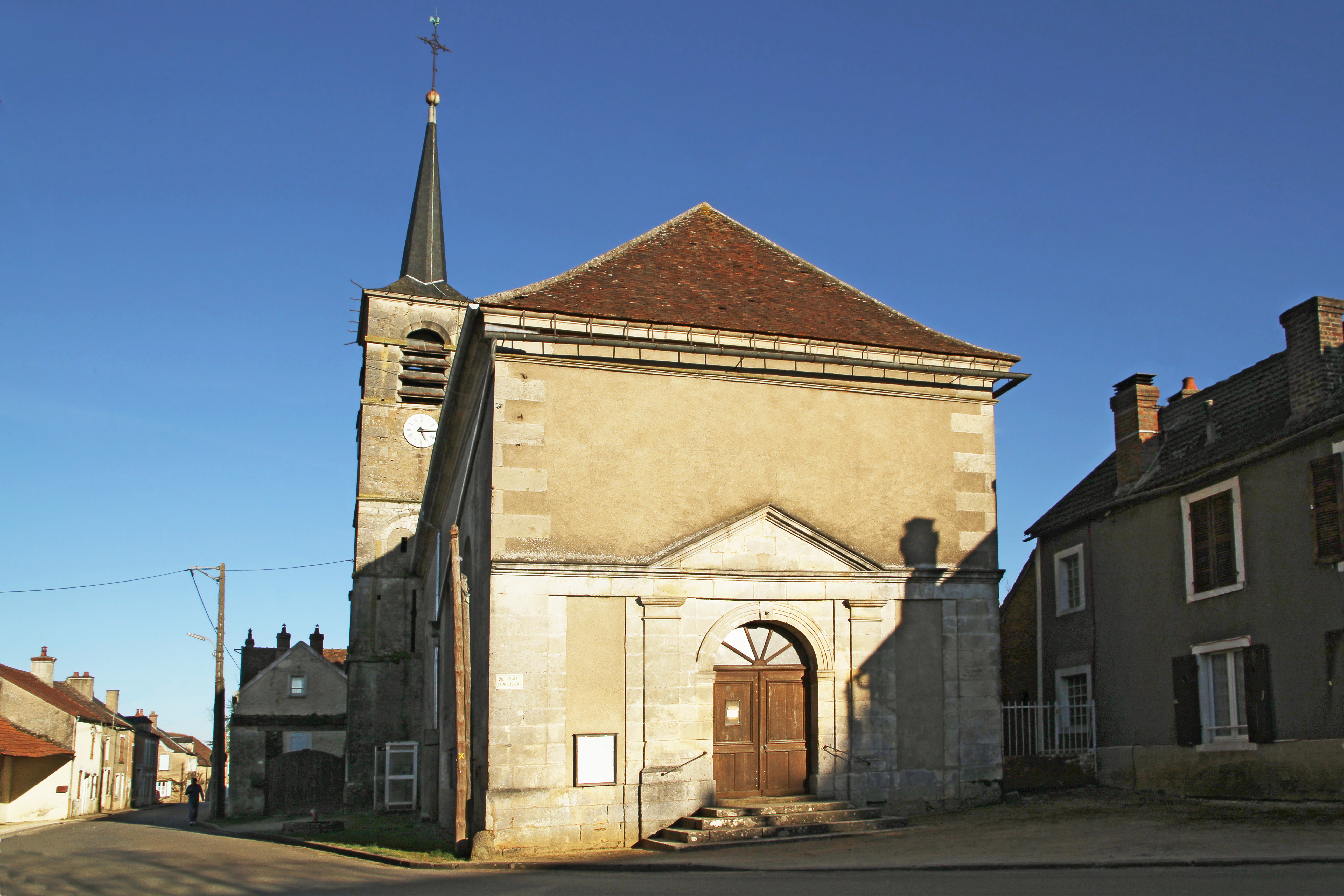 Façade de l'église de Montillot le soir